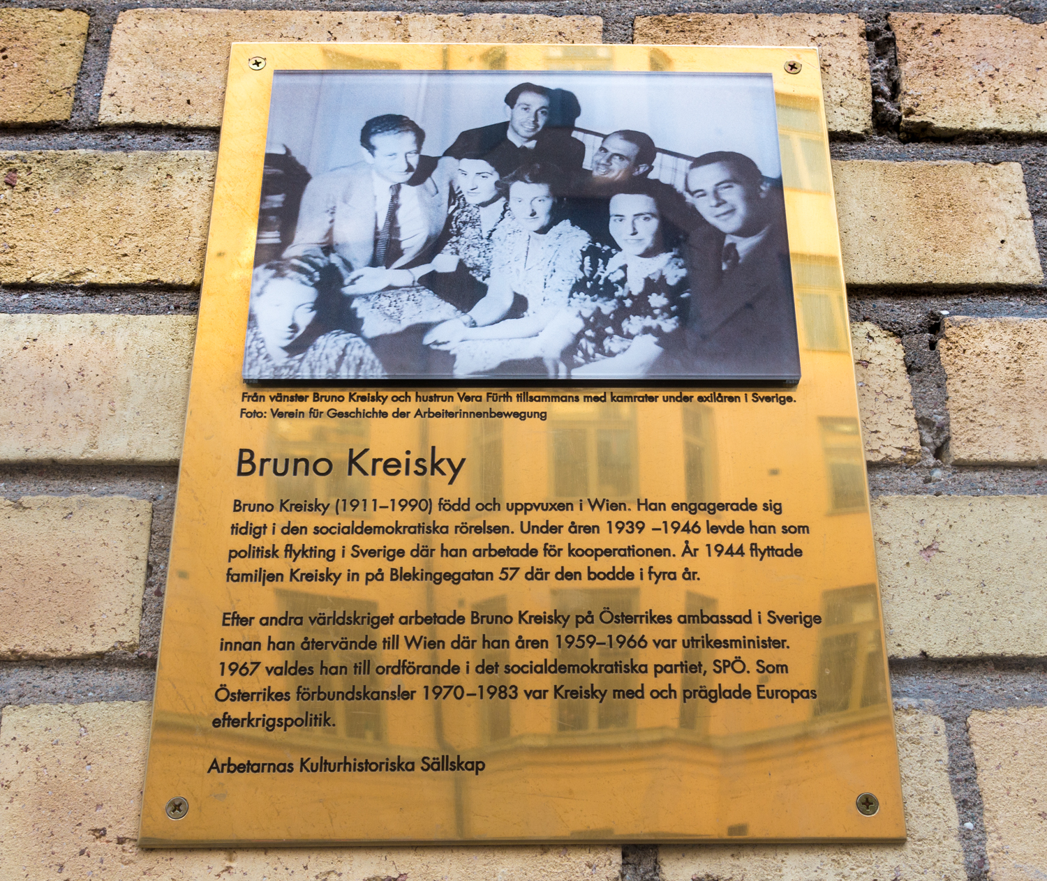 Bruno Kreisky memorial plate at Blekingegatan 57 in Stockholm.